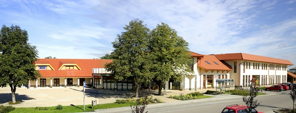 Dorfzentrum